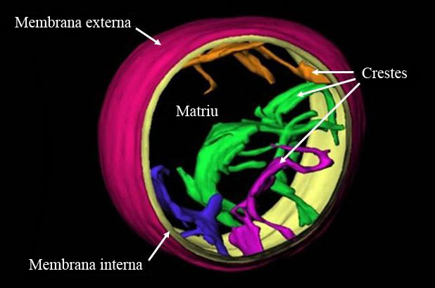 Part d'un mitocondri